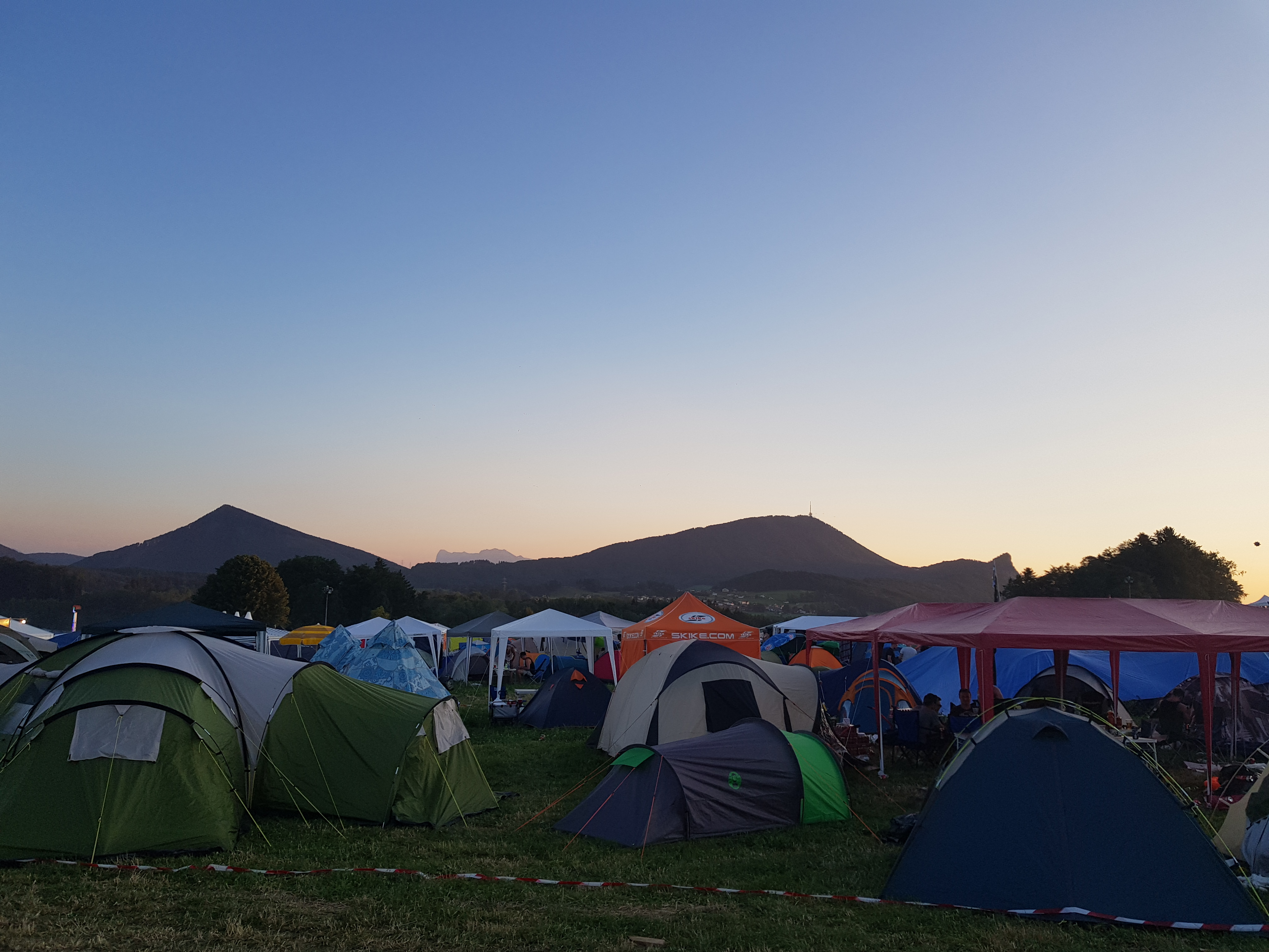 ELF Camping Platz